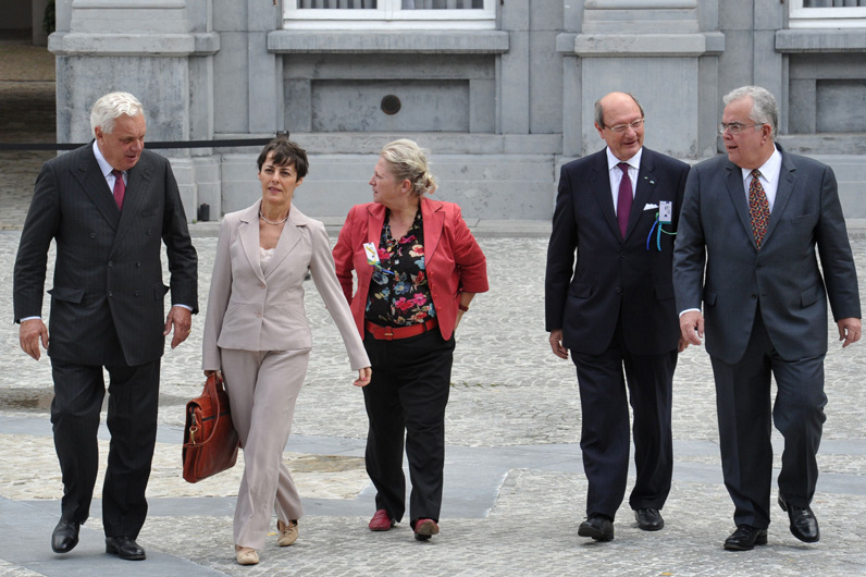 O lançamento da 23ª edição do Festival Europalia, que aconteceu nesta terça-feira (21), em Bruxelas, dedicado neste ano ao Brasil, mostrou a consolidação de uma nova postura com que o país se apresenta no cenário internacional, de um lado, e, de outro, a chance de se requalificar a visão que os europeus têm do Brasil. Isso, na opinião dos próprios anfitriões. Foto: Inge De Keyser